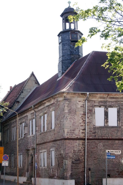 Rathaus der Neustadt in der Lutherstadt Eisleben, Sachsen-Anhalt, Deutschland